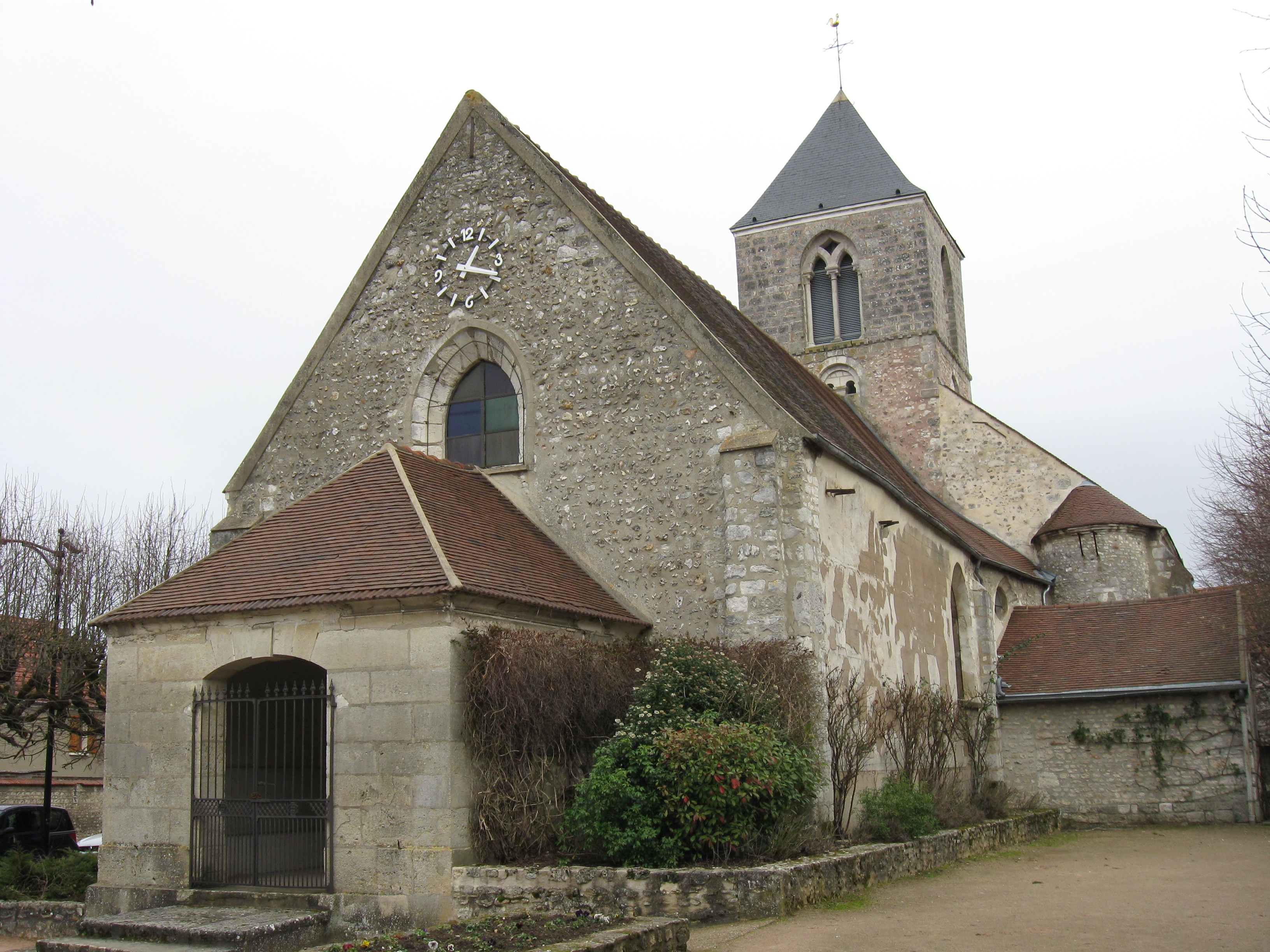 Église Saint-Sulpice de Limetz-Villez. (Yvelines, région Île-de-France).